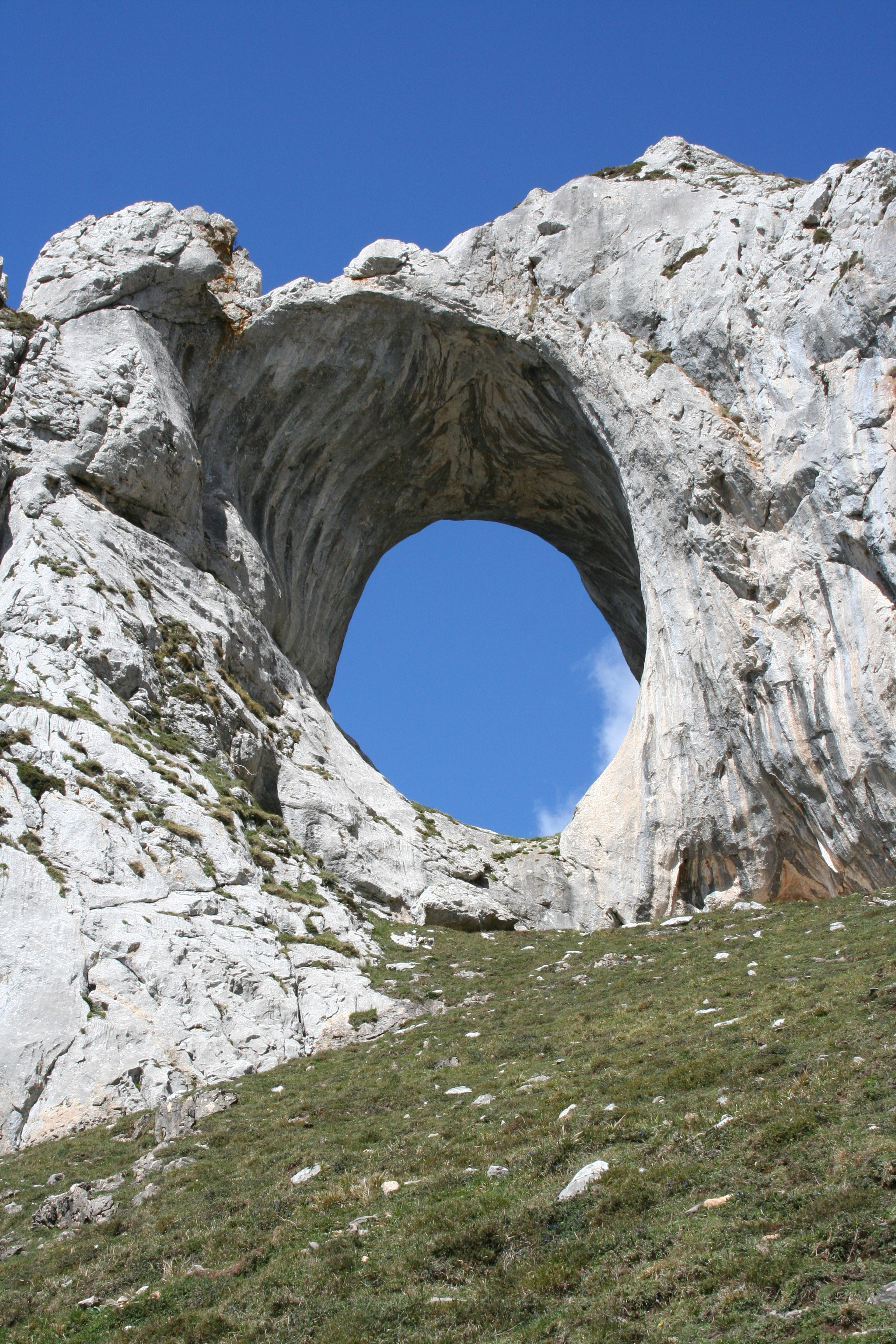 Ojo de buey en la ladera de Peña Mea, en Asturias